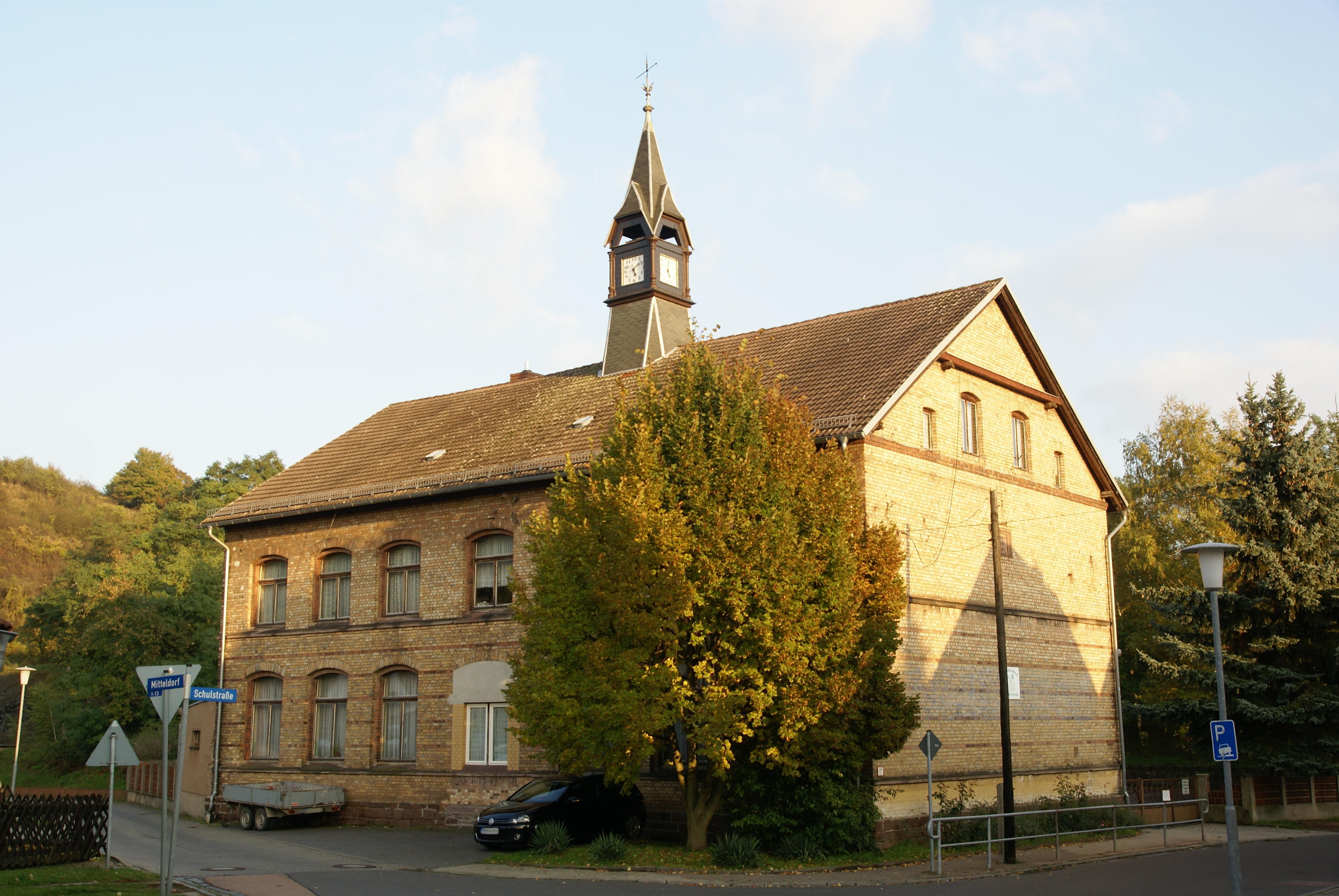 Die Grundschule in Wimmelburg, erbaut 1896